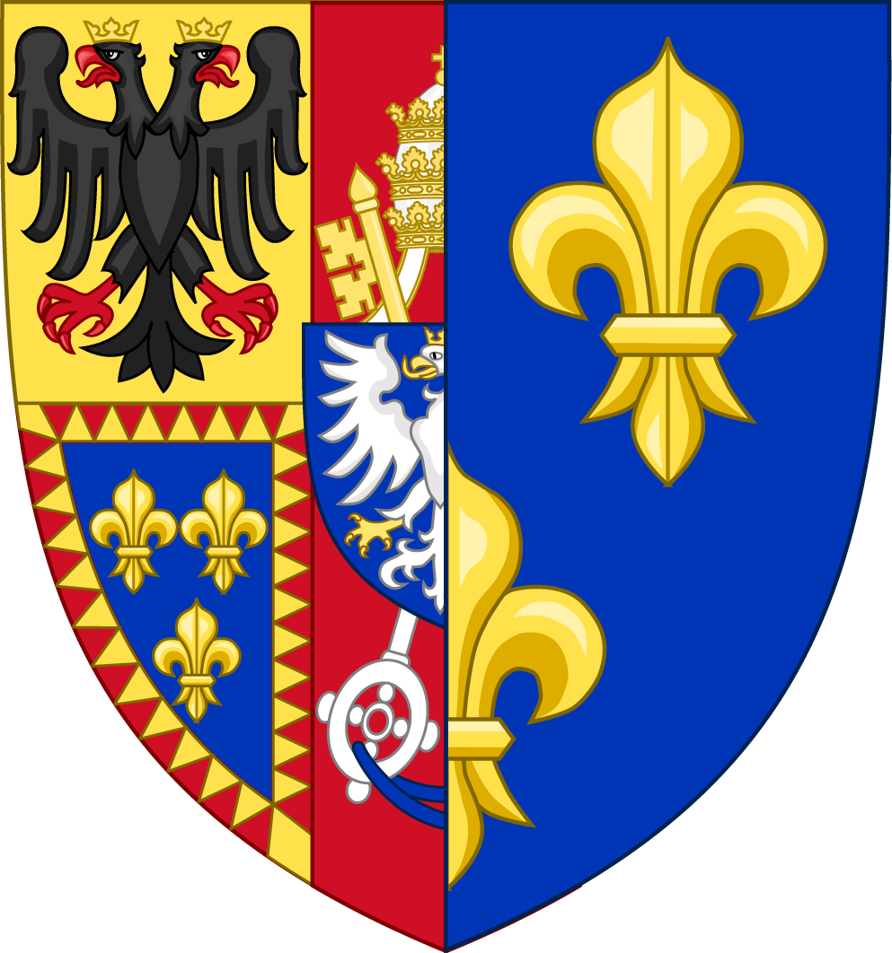 Armes de Renée de France